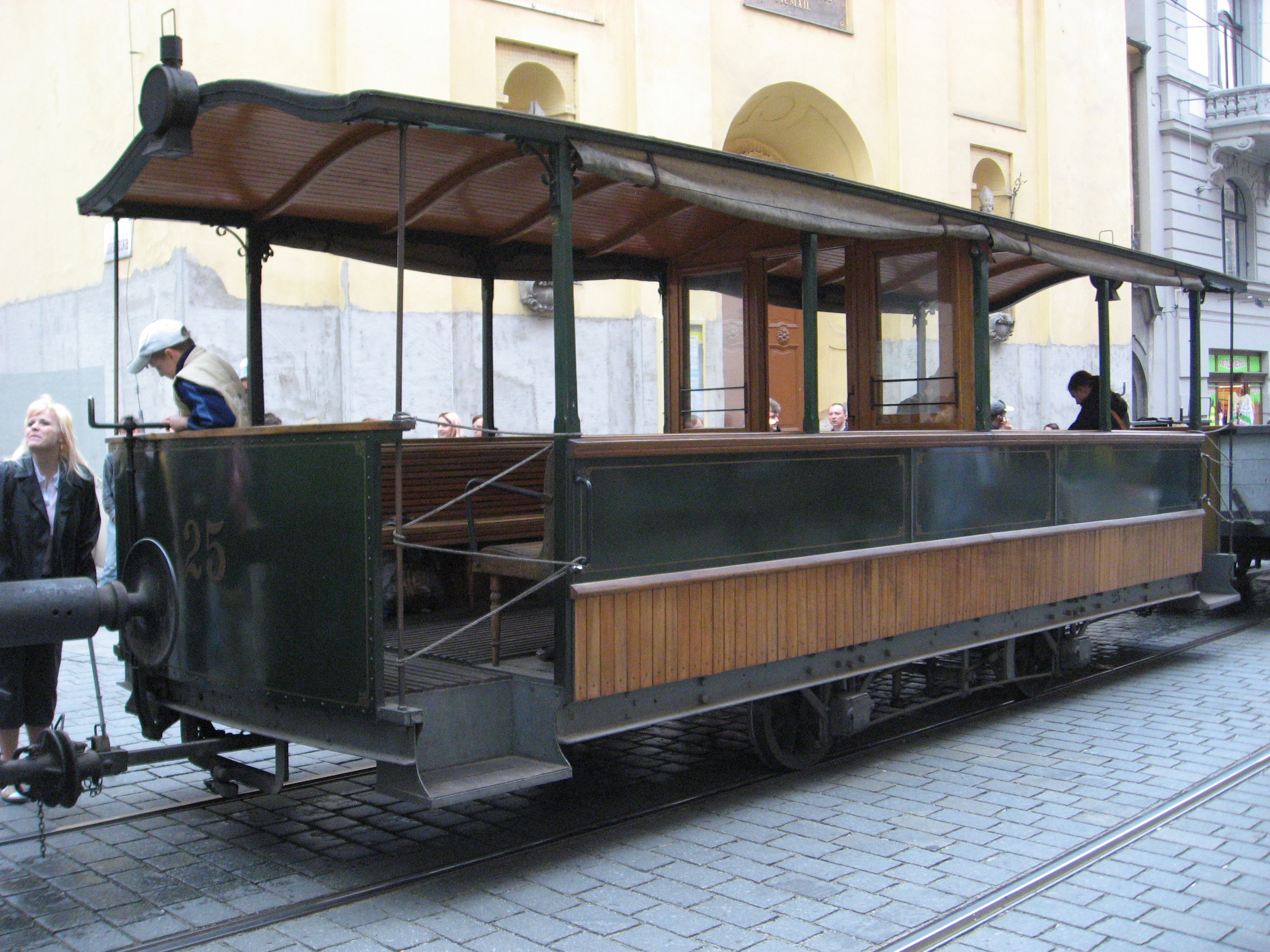 Brno, 140 let MHD